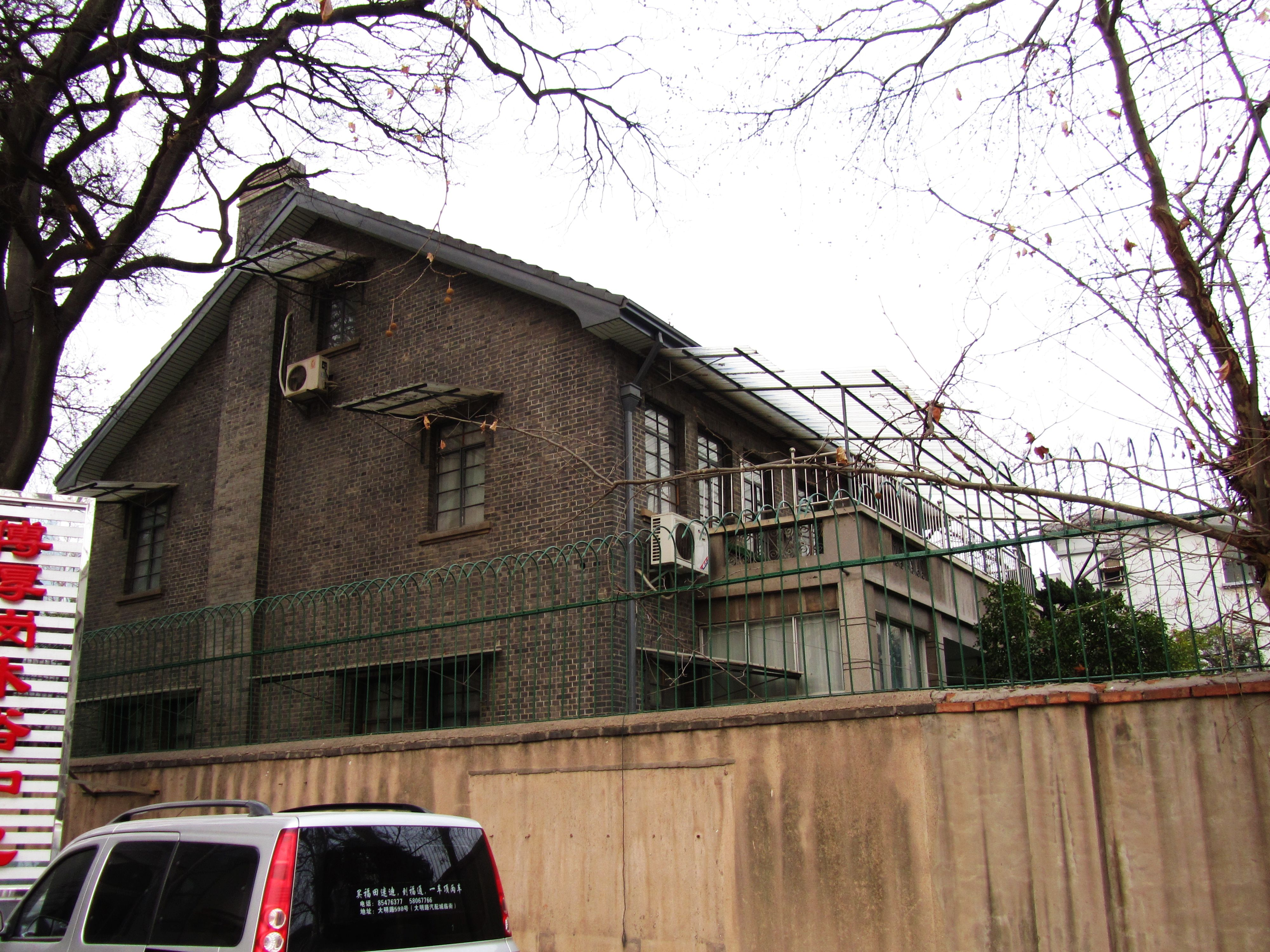 南京傅厚岗30号李宗仁公馆旧址。